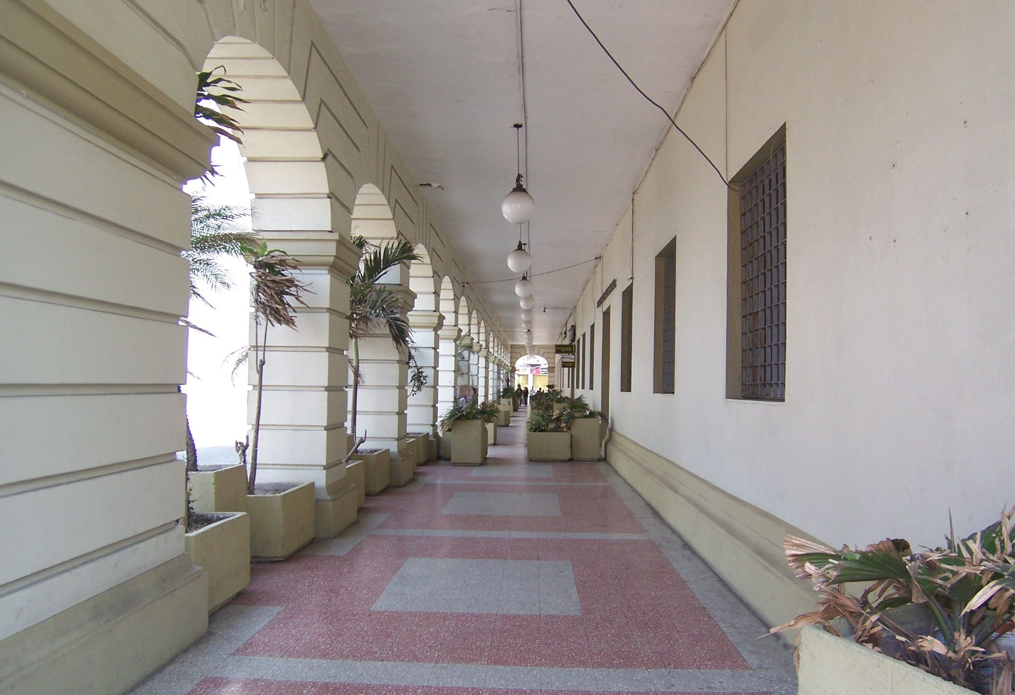 Portales del Palacio Federal de la Ciudad de Veracruz.